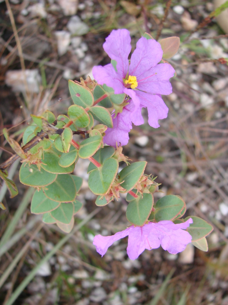 Diplusodon microphyllus - LYTHRACEAE Quilombo Kalunga - Cavalcante - Goiás - Brasil